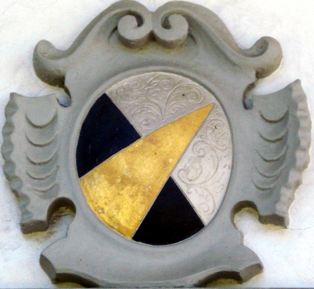 Wappen von Buonas, Schweiz